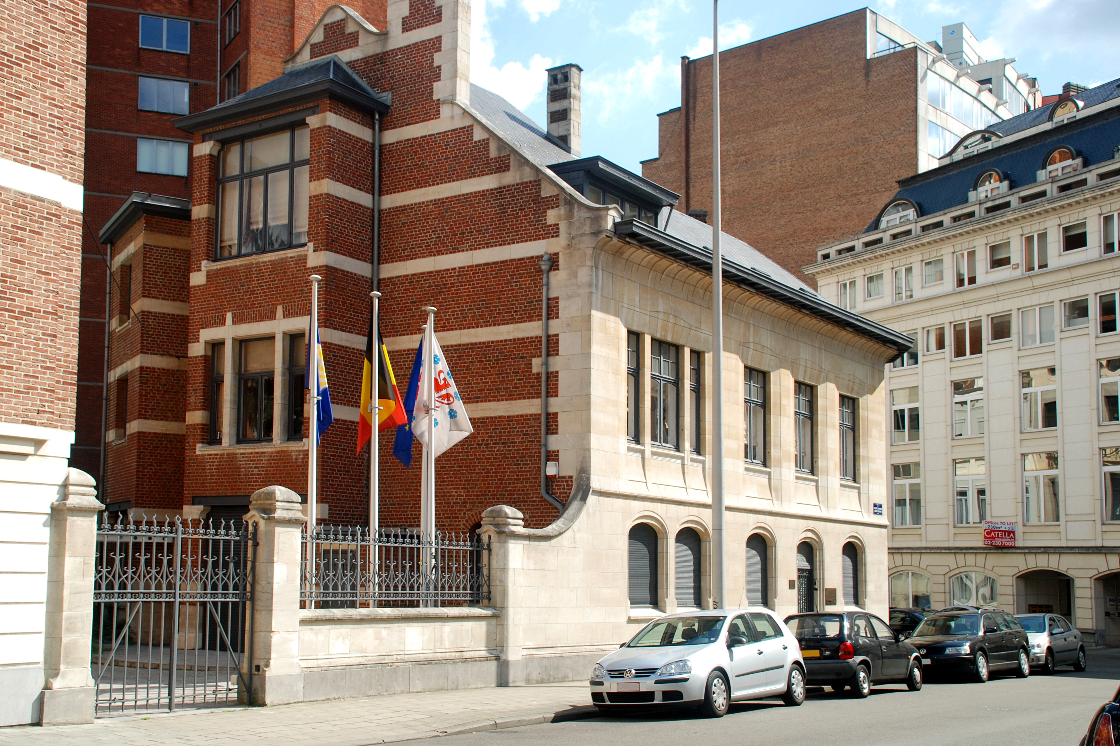 Belgique - Bruxelles - Hôtel De Brouckère